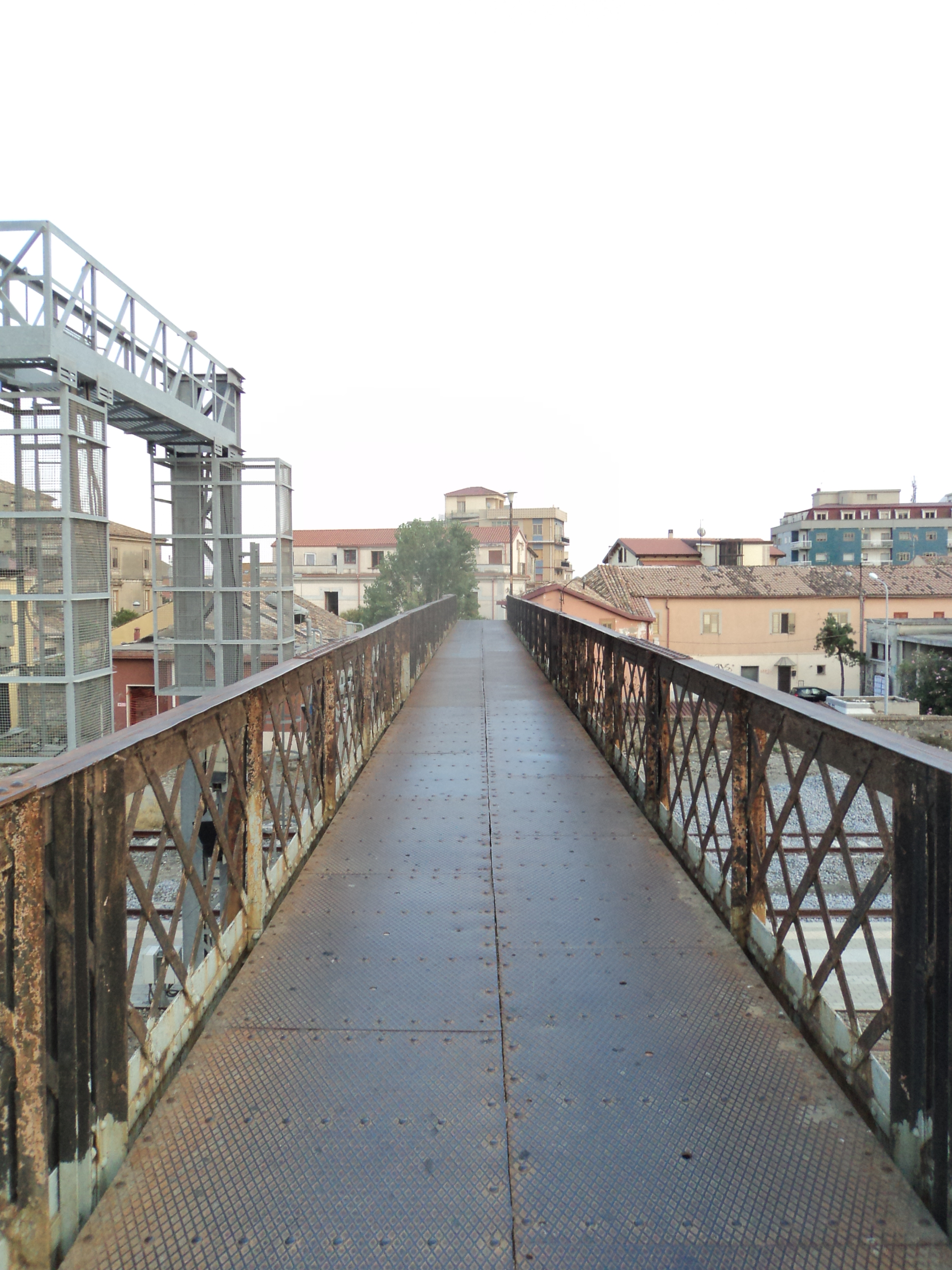 Ponte del 1928, passa sopra della Stazione di Catanzaro Lido.